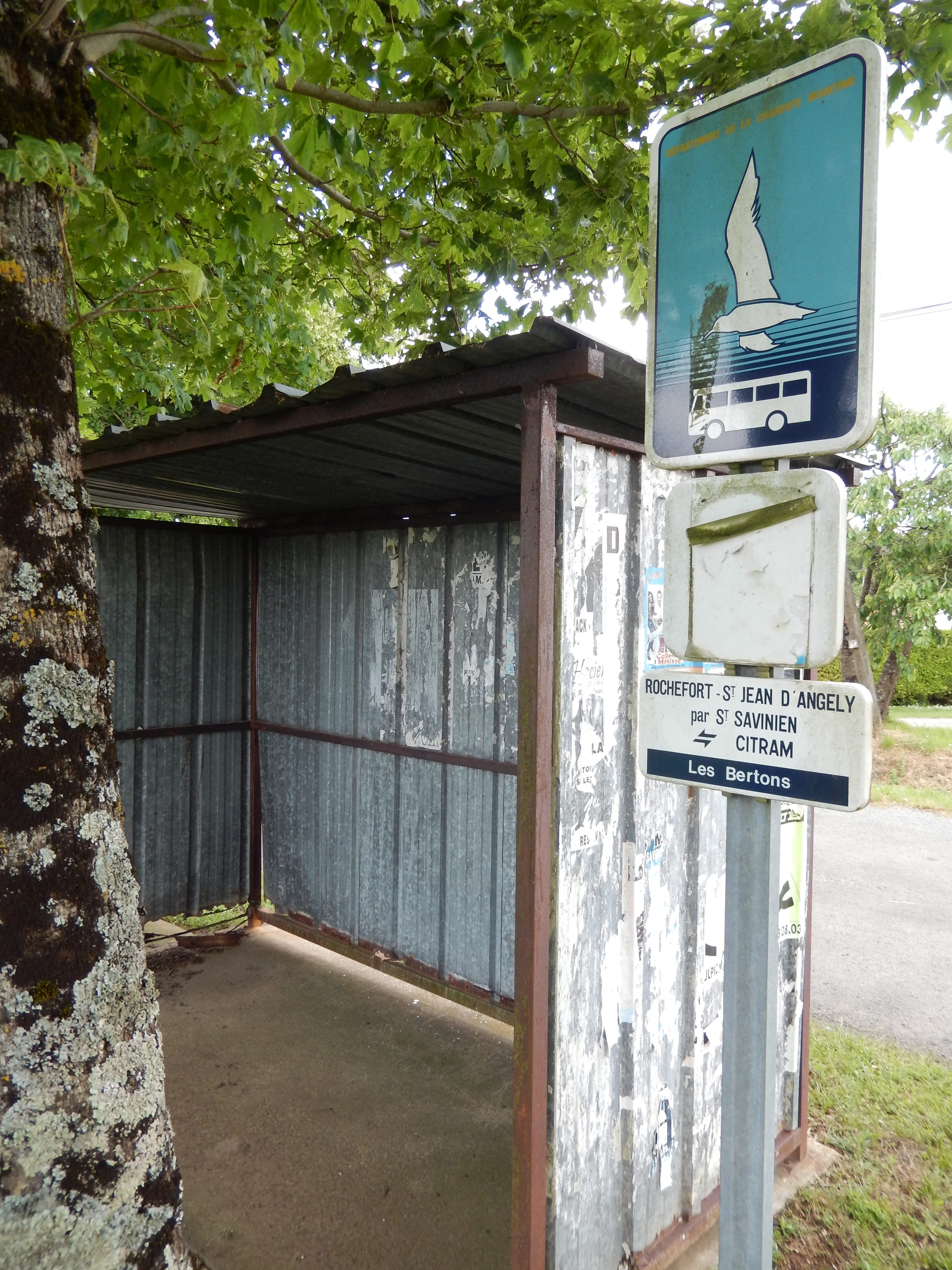 Arrêt de bus Les Bertons à Saint-Savinien en Charente-Maritime (France).